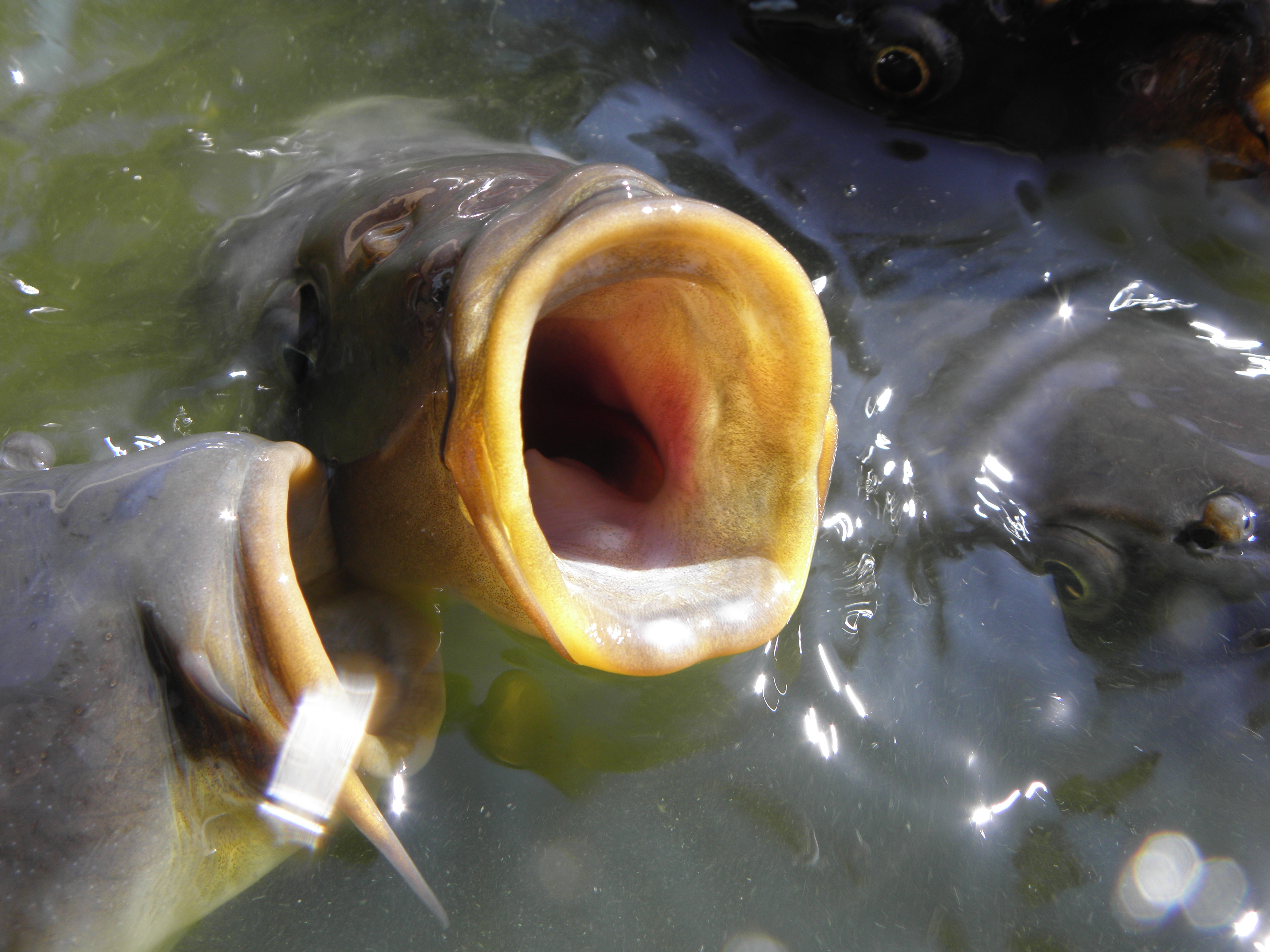 Cyprinus capio